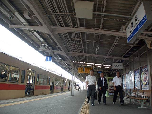 JR西日本和歌山線・橋本駅